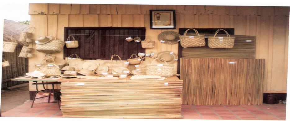 Mimbreria Villa del Rosario